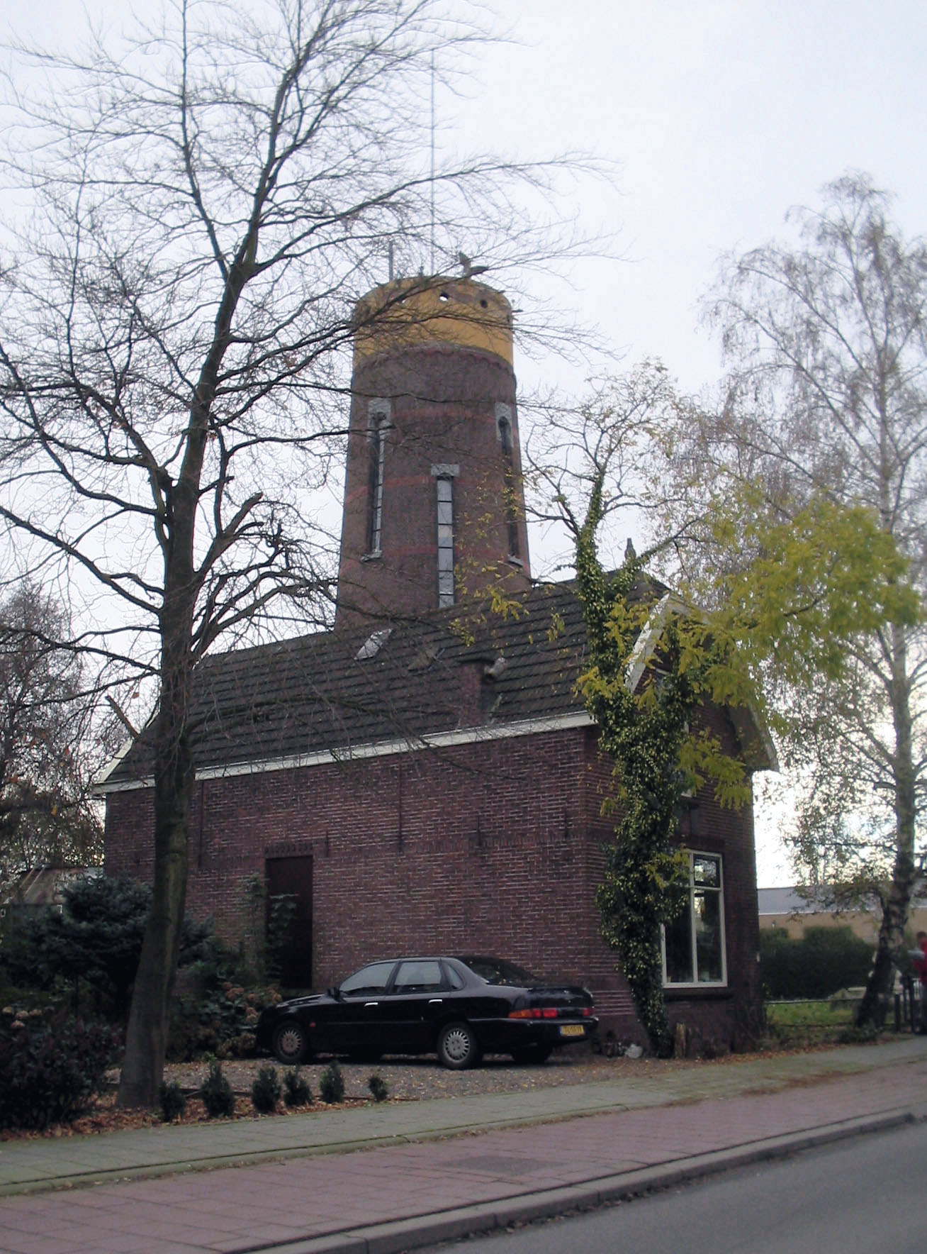 Boskoop: Watertoren anno 1909 "De Hoge hoed" De kop is gedemonteerd onder toezicht van Rijksmonumentendienst vanwege instortingsgevaar. Architect J.Schotel ,deze heeft er 16 gebouwd waarvan er nog ongeveer de helft is overgebleven.